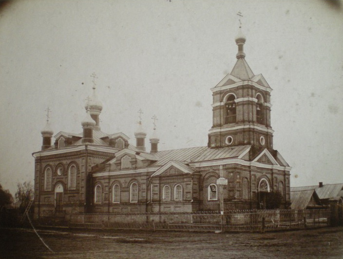 Успенская церковь (Ближне-Песочное), начало XX века